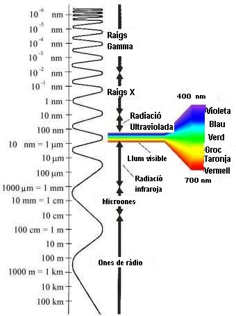 Gràfic de l'espectre electromàgnetic